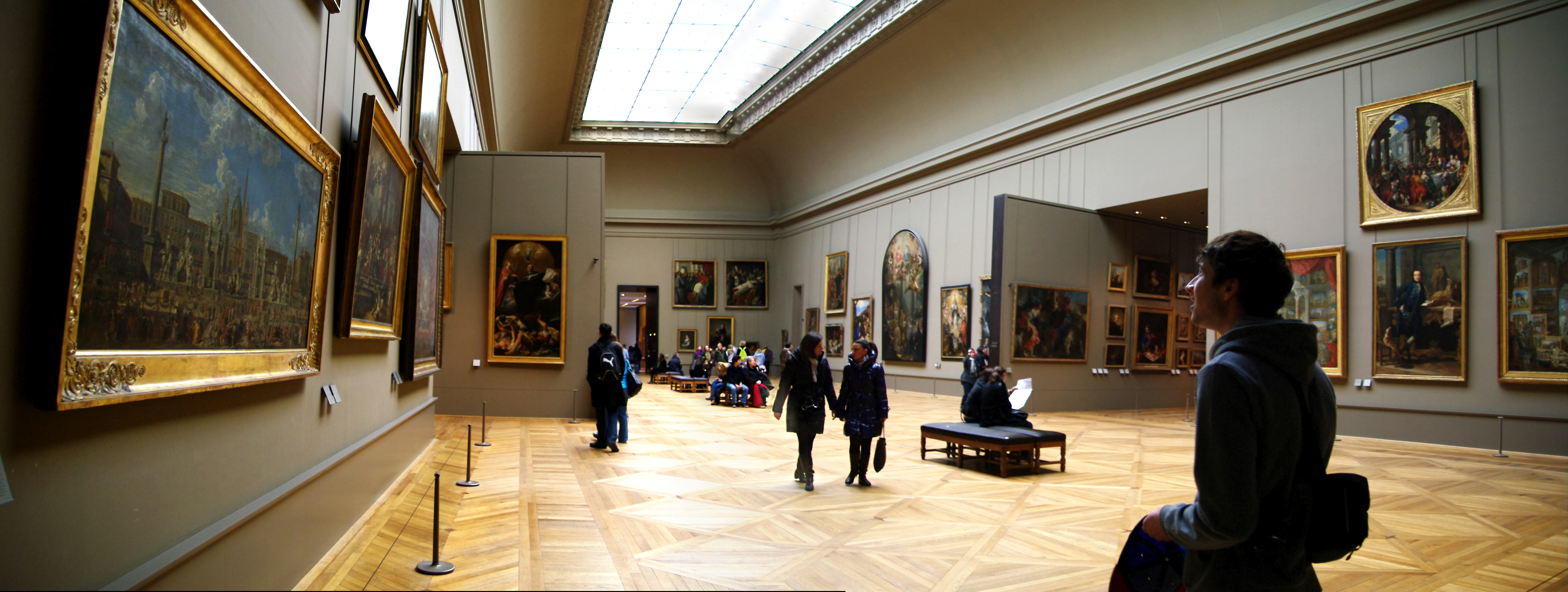 Panorama Louvre